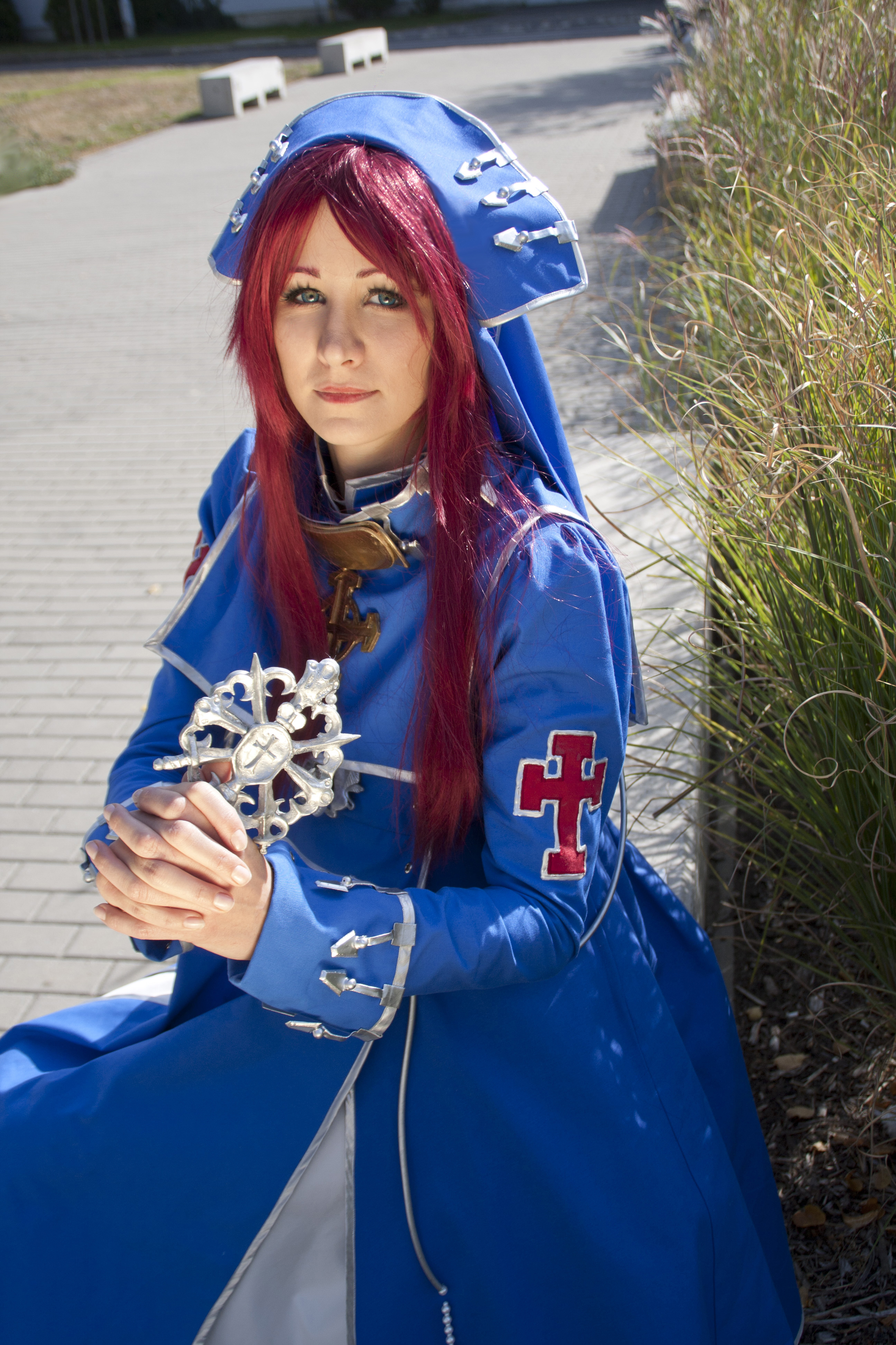 Esther Blanchett